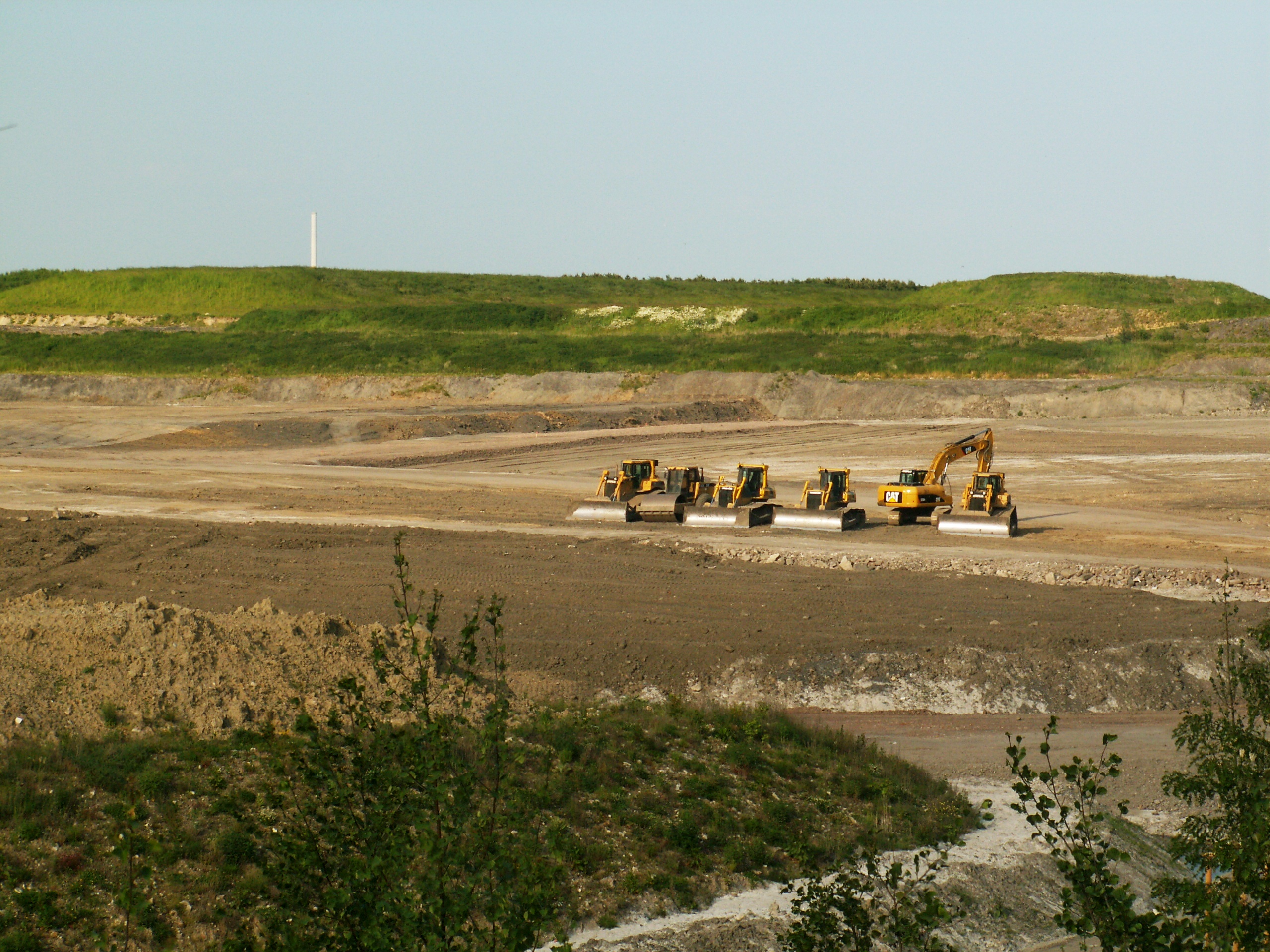 Auf der Hald Große Holz wird immer noch taubes Gestein abgeladen und muss verteilt und verfestigt werden, dazu parken hier die Baumaschinen am Wochenende